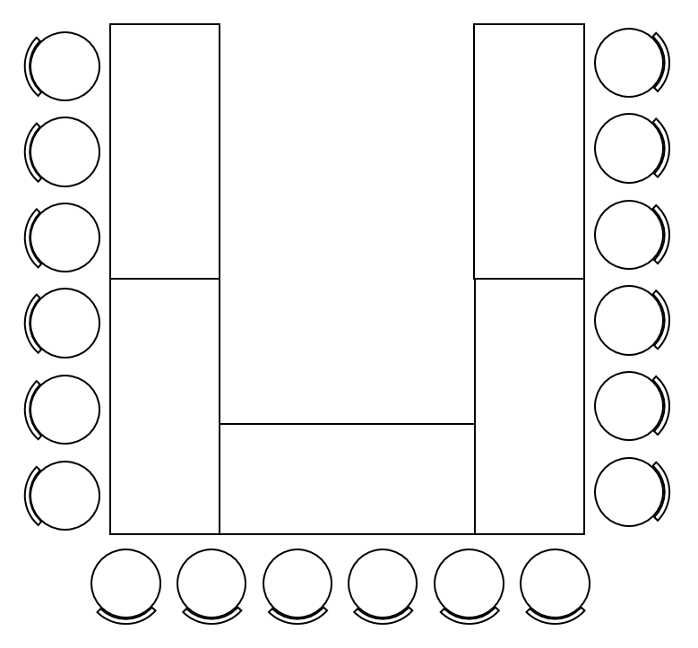 Bordoppsett Hestesko